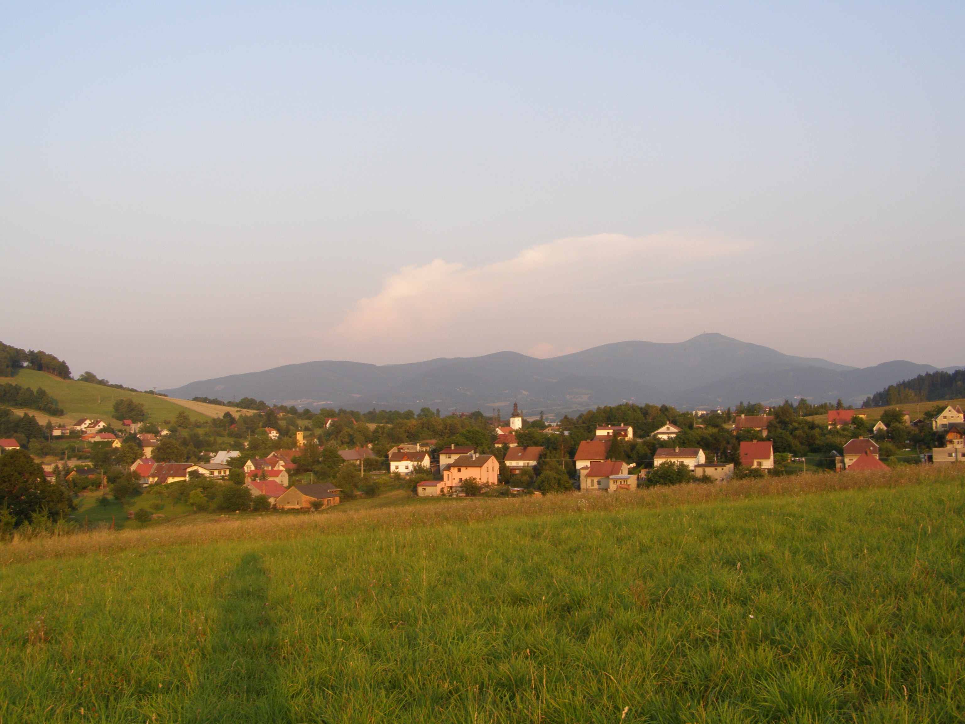 Metylovice, pohled ze severozápadu, v pozadí Lysá hora